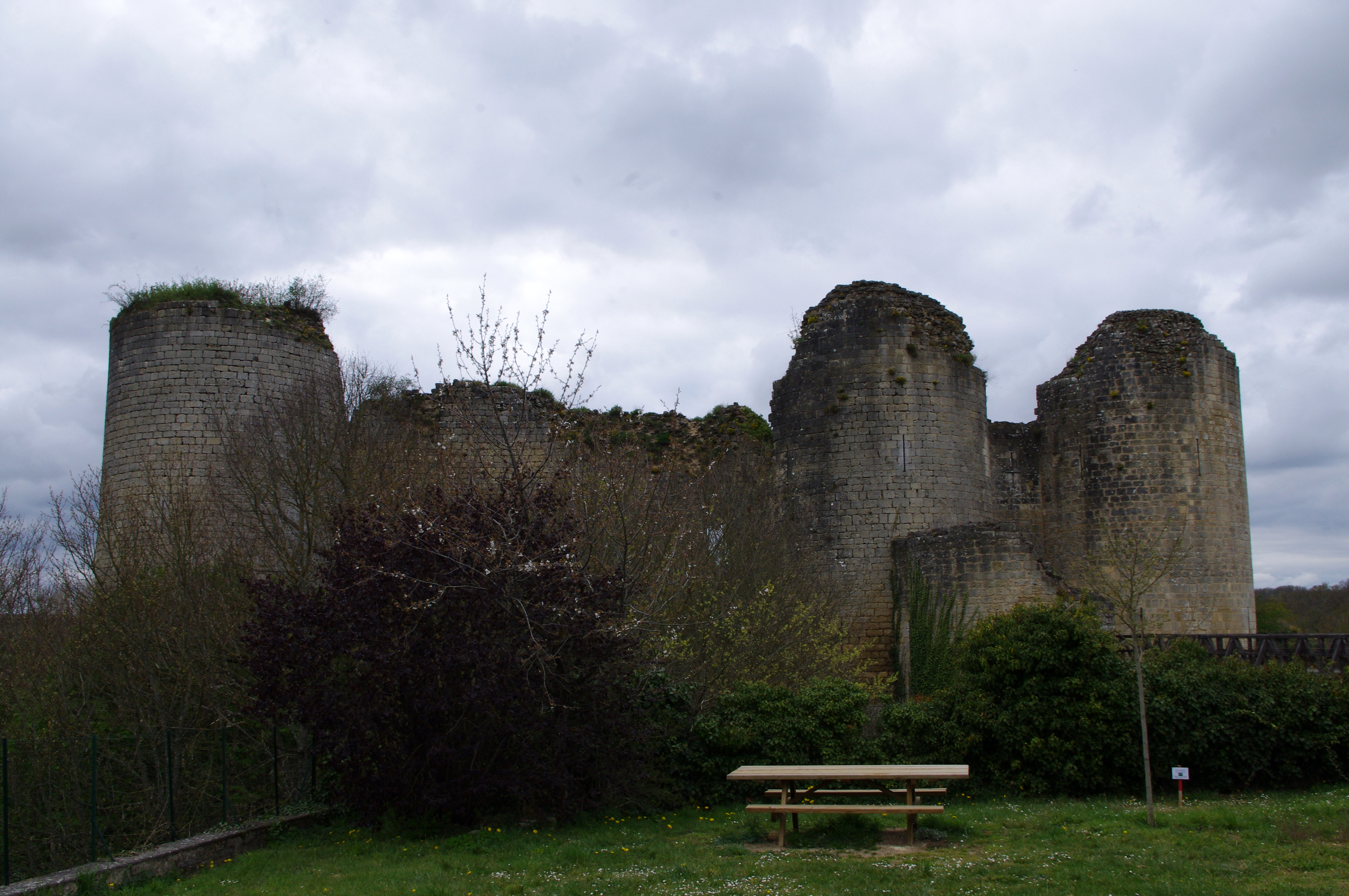 Château de Gençay (Vienne, France)